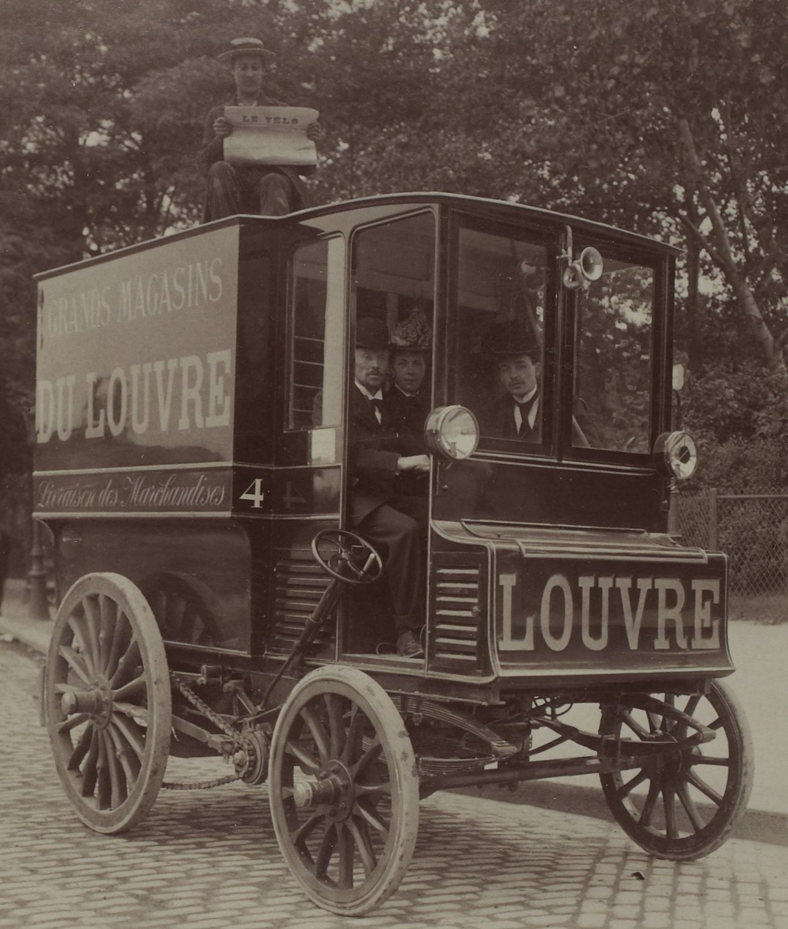 [Collection Jules Beau. Photographie sportive] : T. 9. Année 1899 / Jules Beau : F. 31v. [Soixante kilomètres dans une voiture de livraison]